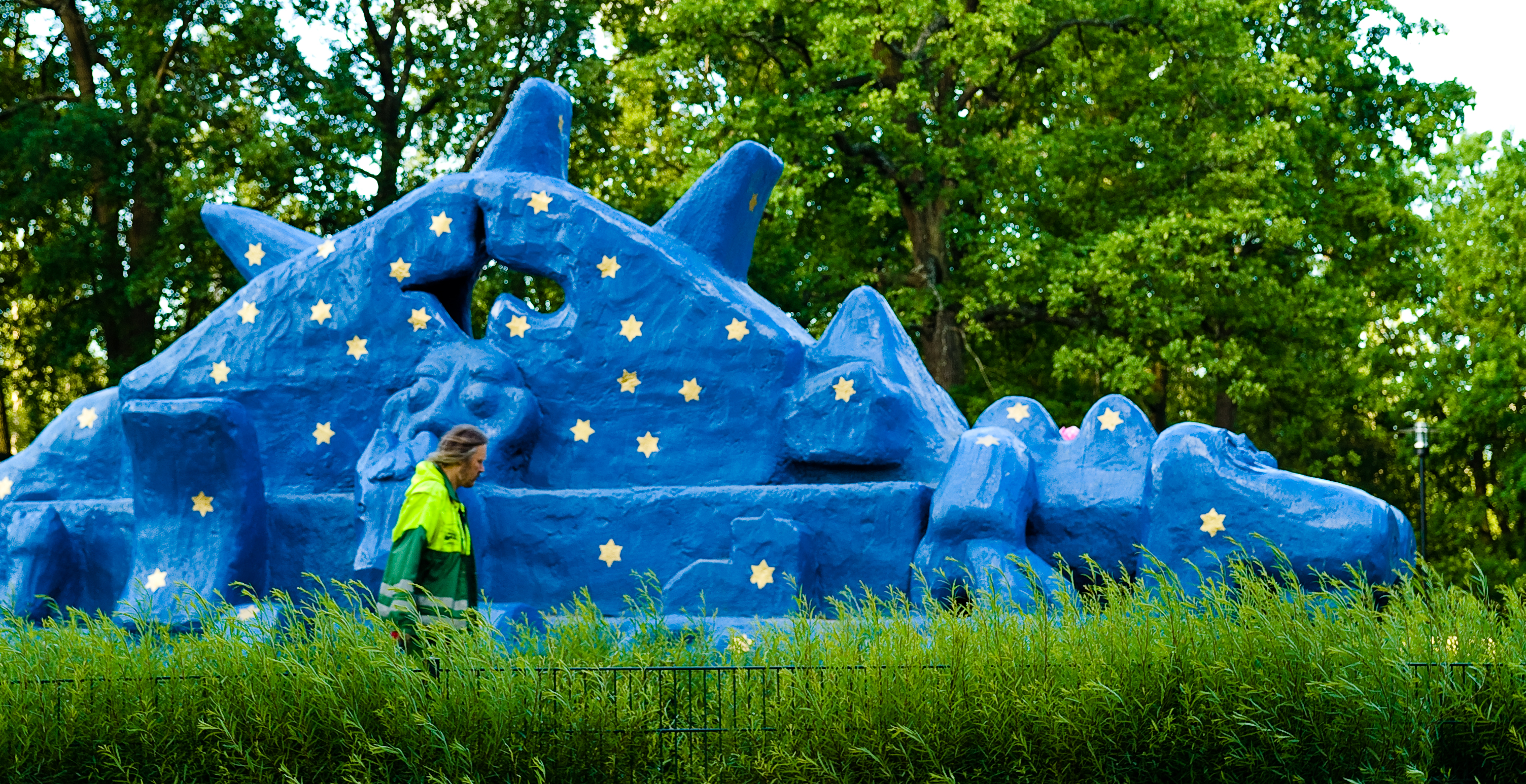 Dinosaur at Seikkailupuisto (adventure park) in Turku, Finland